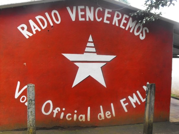 hahajak